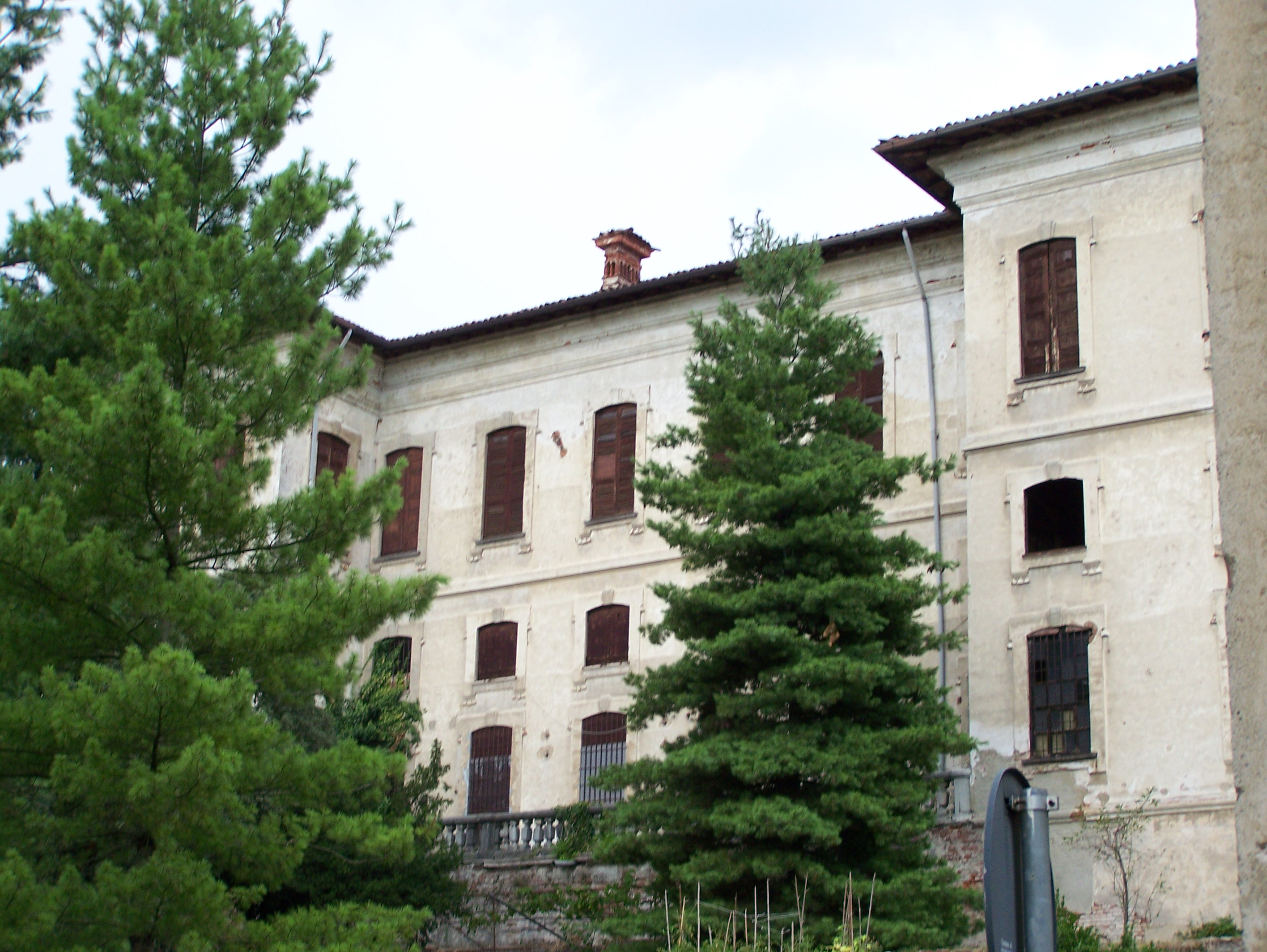 Palazzo Clerici a Castelletto di Cuggiono (MI) - Italy